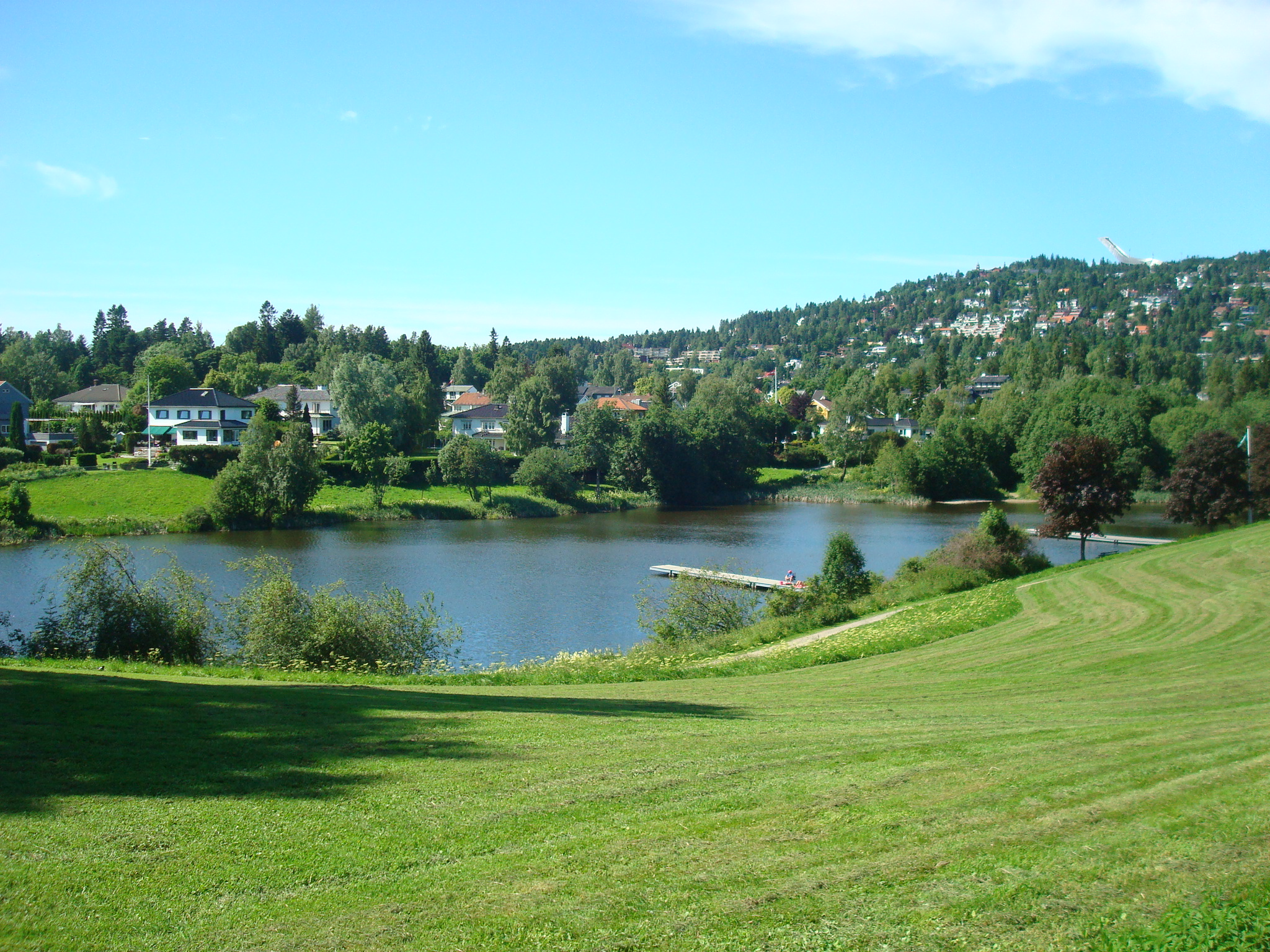 Holmendammen i Oslo